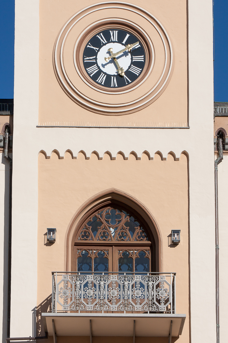 Rathaus; stattlicher, platzbeherrschender Bau mit Spitzturm, neugotisch, erbaut 1865/68.This is a photograph of an architectural monument.